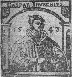 Caspar Bruschius, gestorben 1559